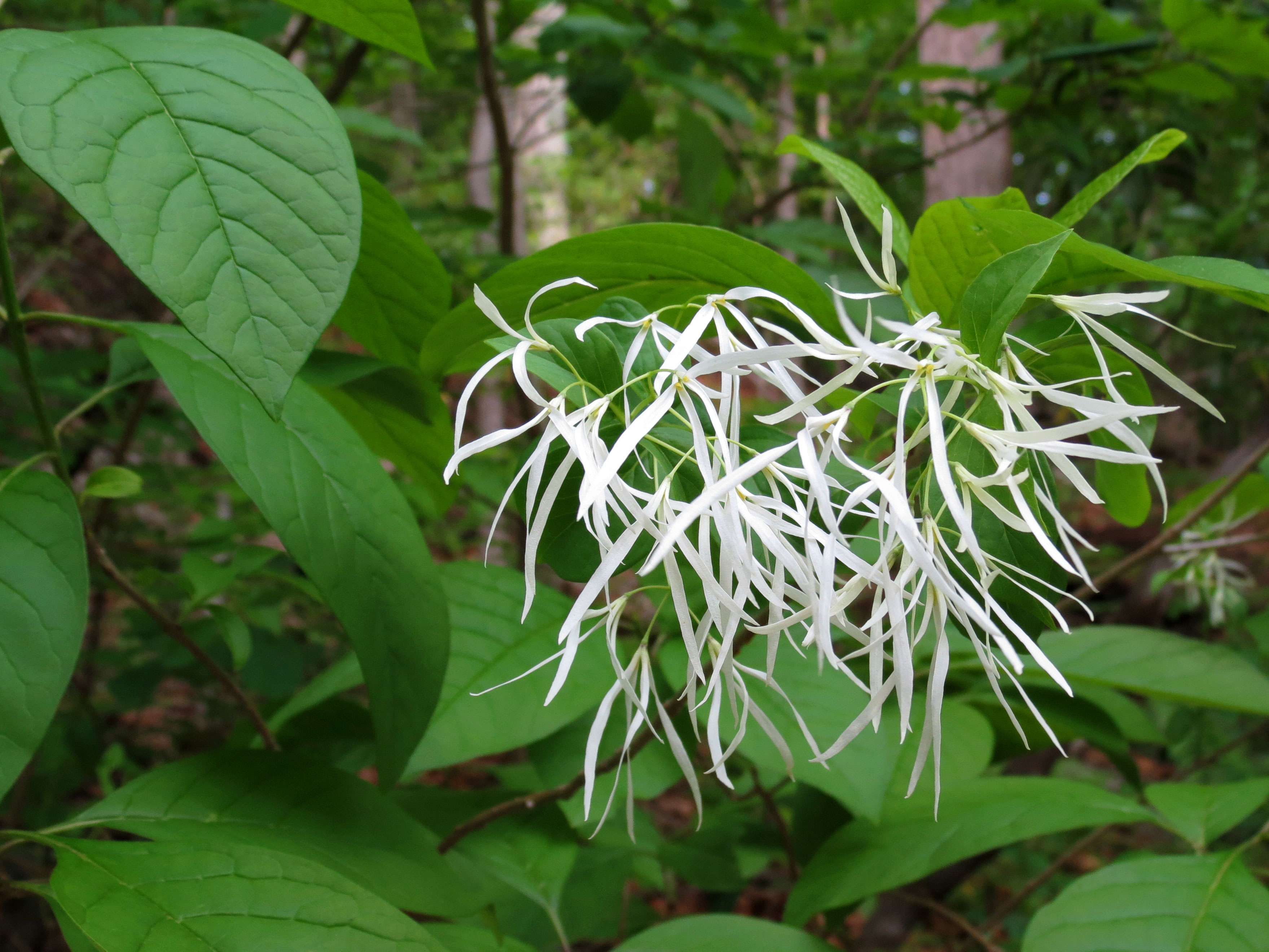 Fringetree